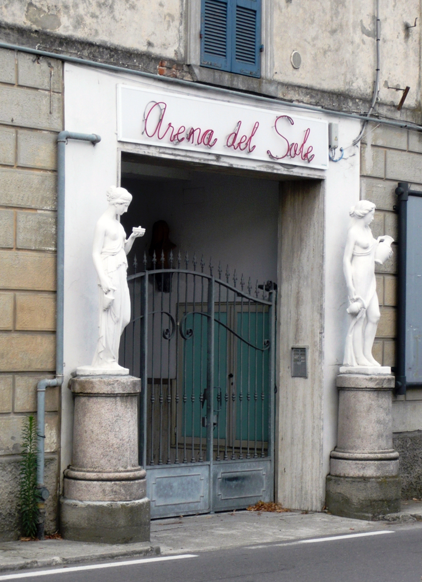 Teatro "Arena del sole" a Roccabianca